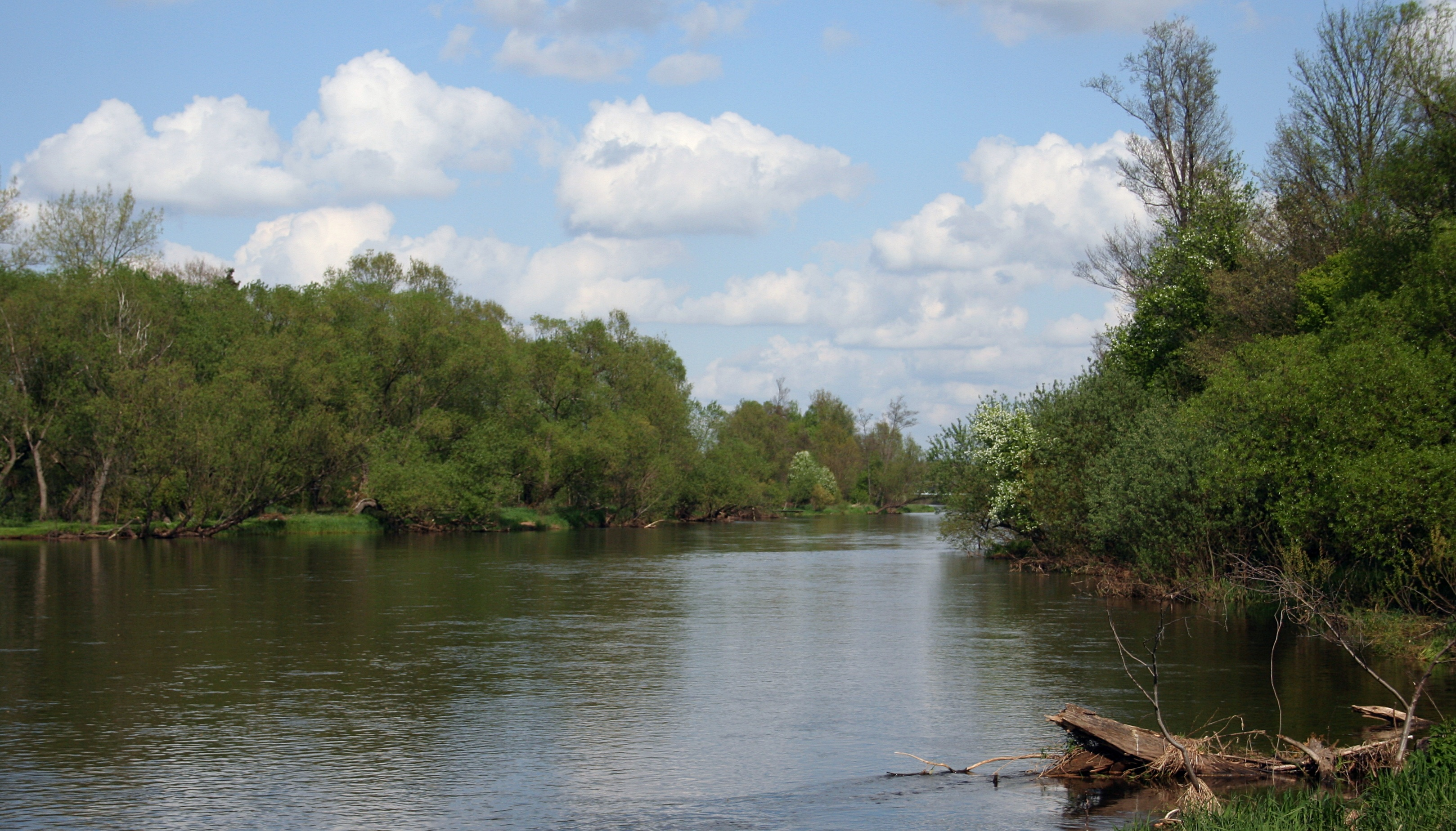 Załęczański Park Krajobrazowy: Warta w pobliżu miejscowości Bobrowniki